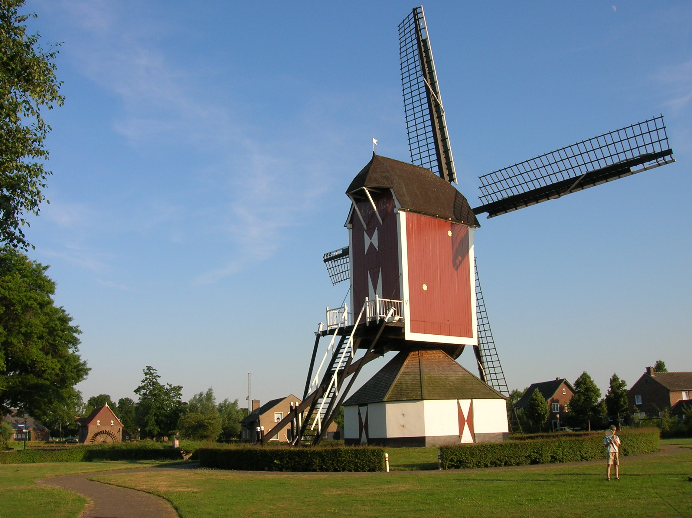 Windmolen de Korenbloem met op de achtergrond watermolen d'n Olliemolen